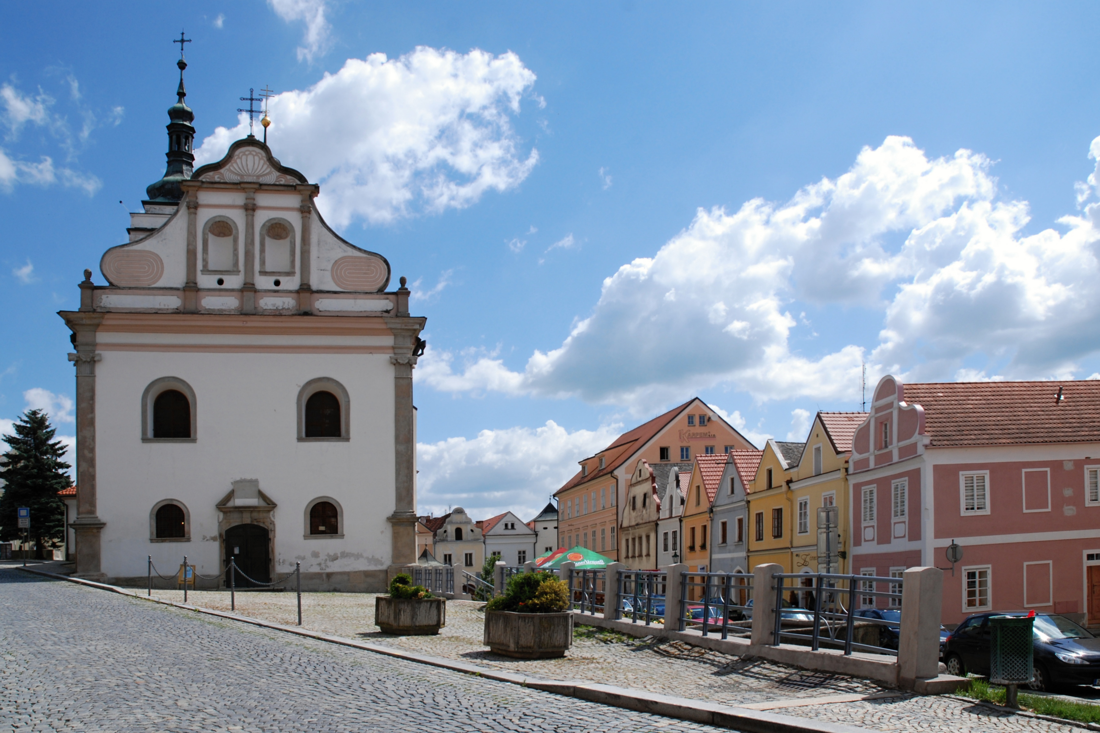 Kostel sv. Petra a Pavla, náměstí Republiky 110, Horšovský Týn